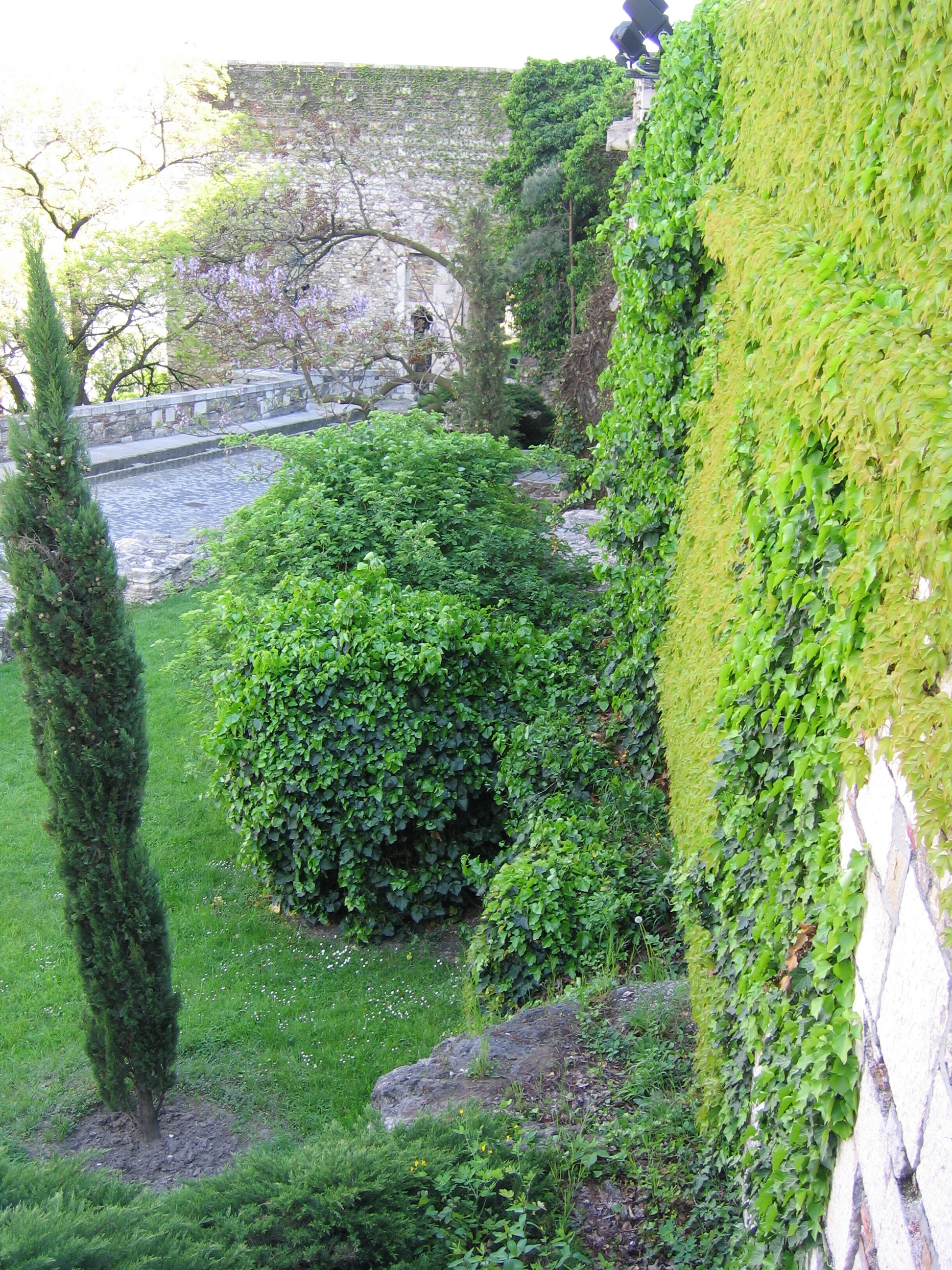 Buda Castle (Budai Vár) Budapest, Hungary